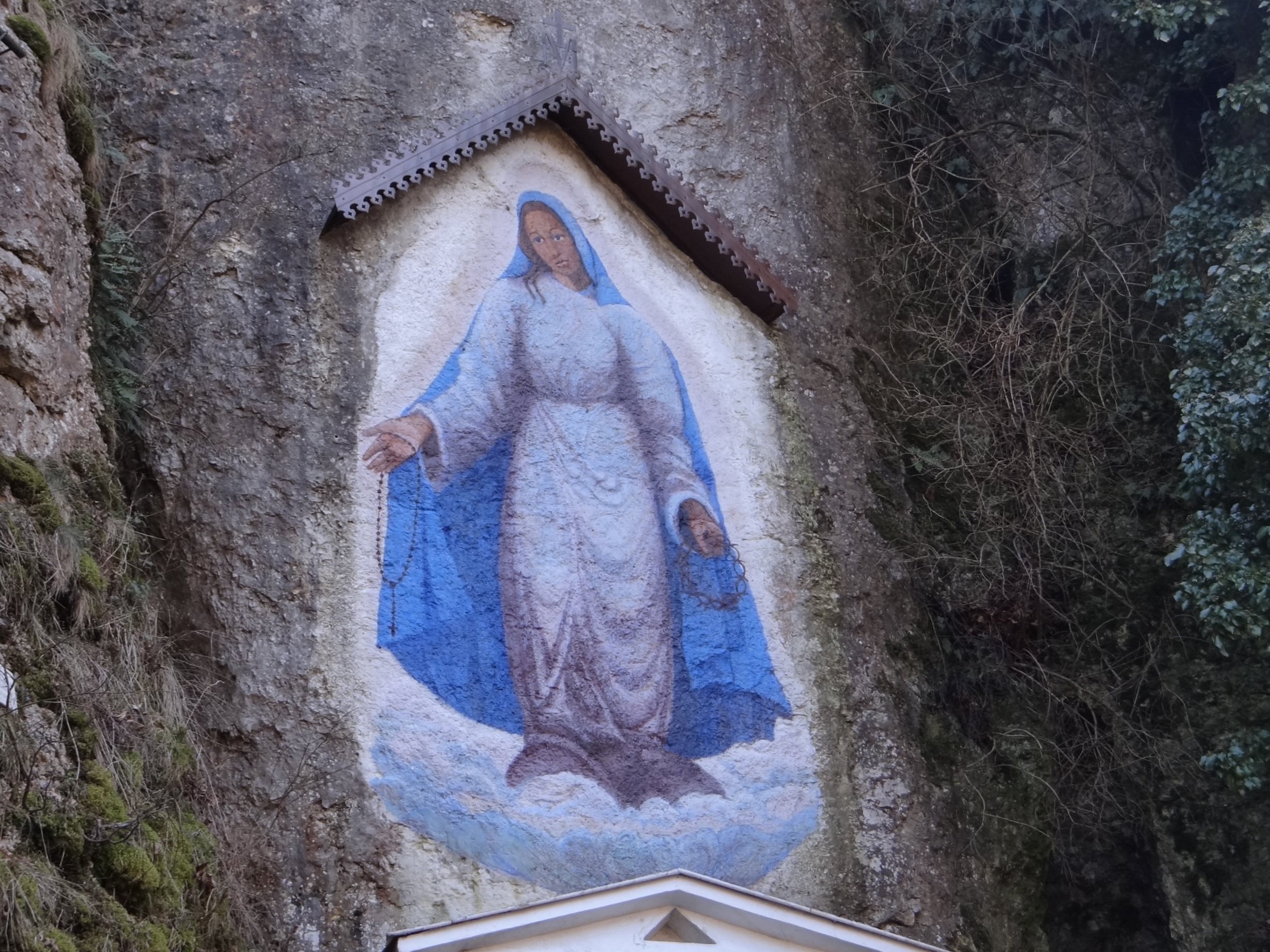 Matka Boska Skalska w Dolinie Mnikowskiej (2015 r.)